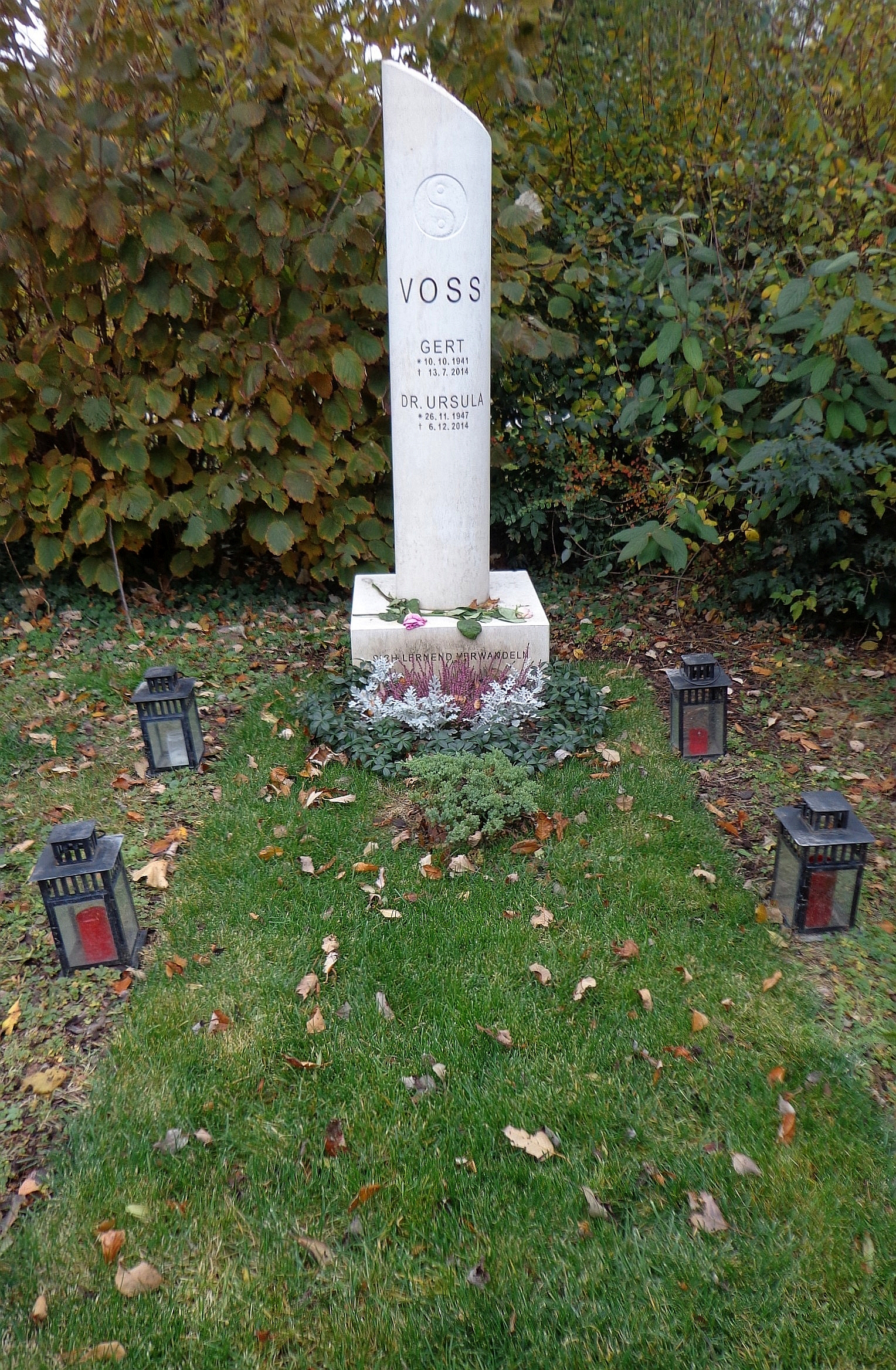 Wiener Zentralfriedhof - Gruppe 33G, Ehrengrab von Gert Voss